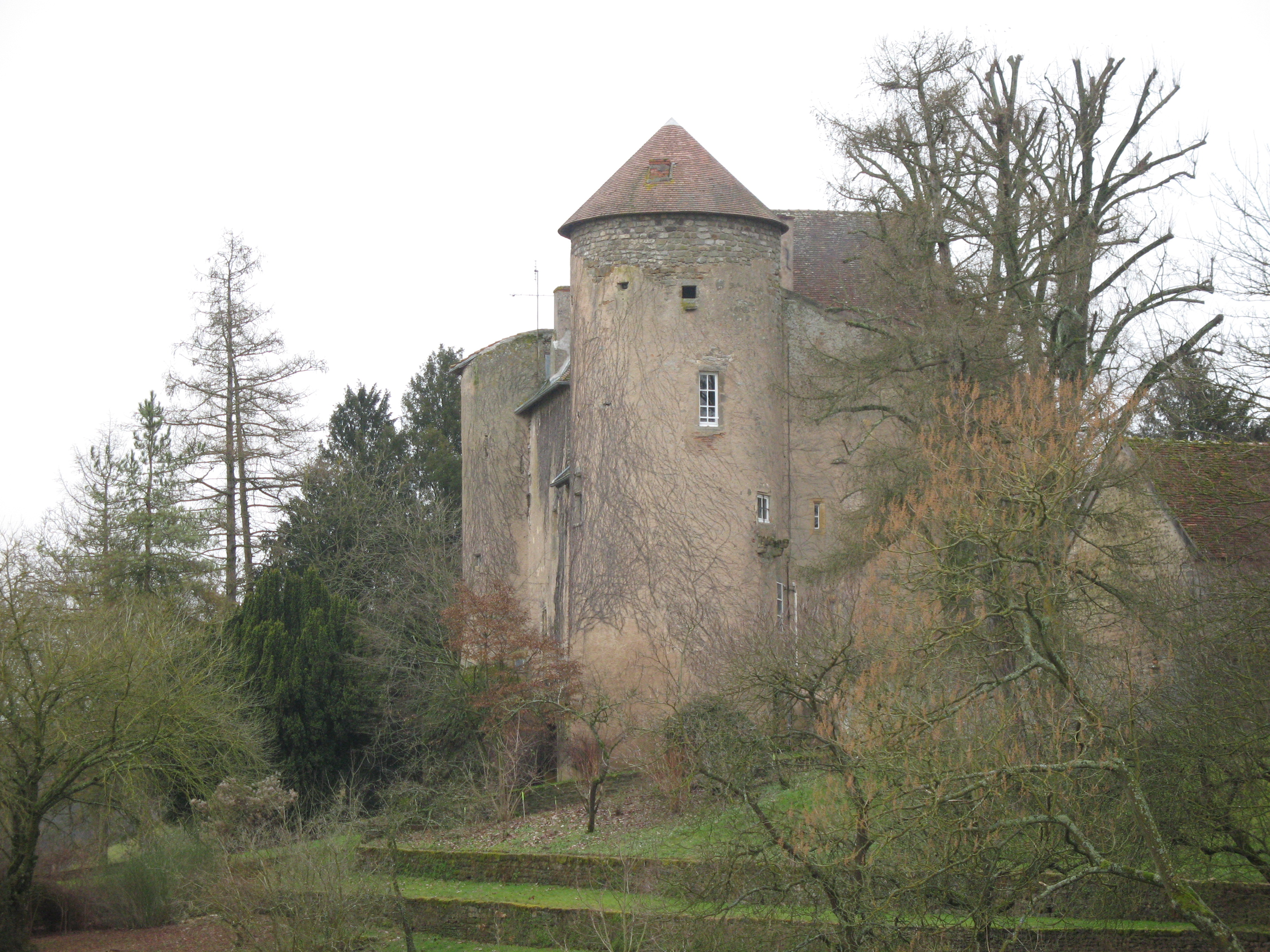 château de Marcilly-la-Gueurce (Saône-et-Loire)